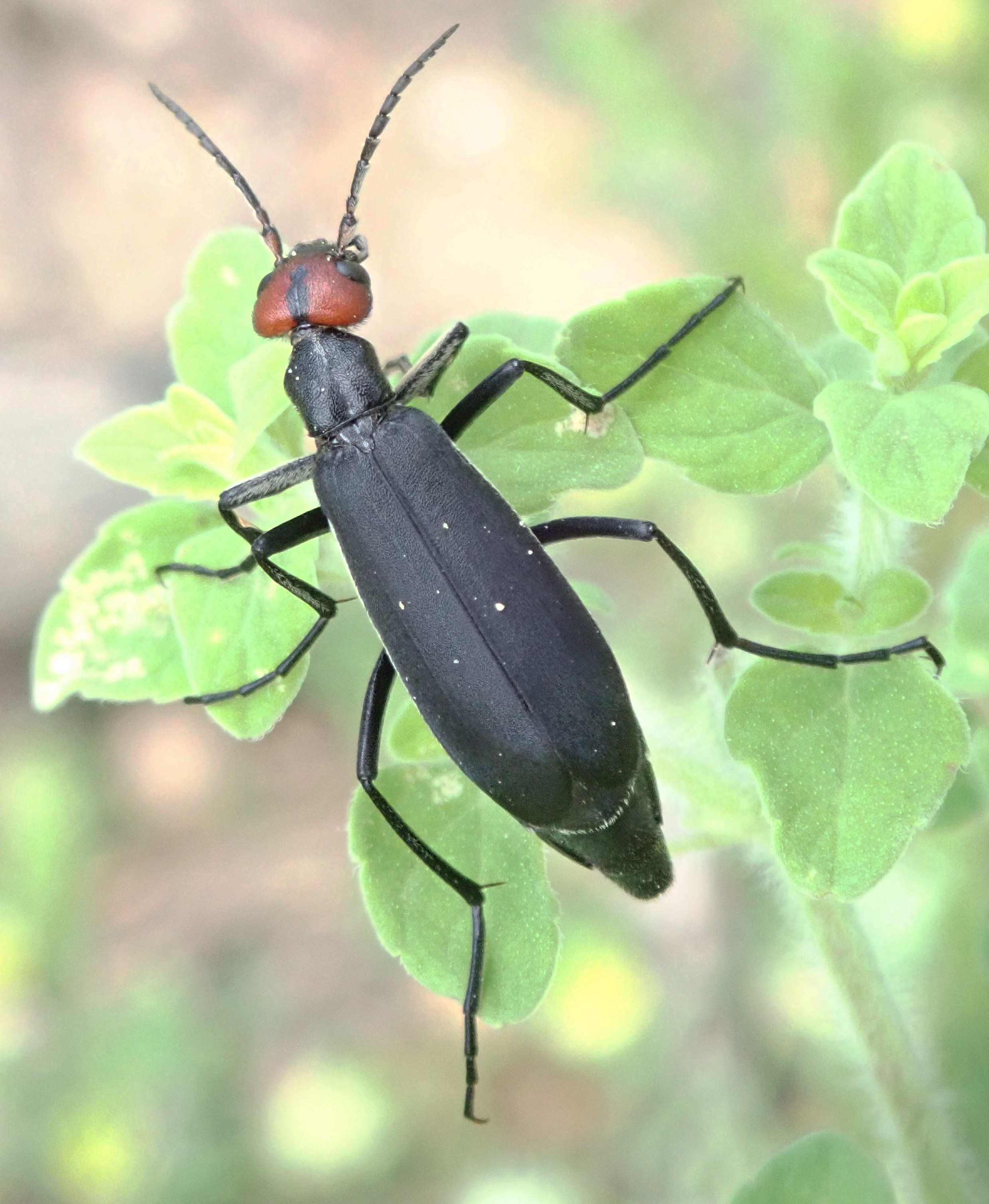 Epicauta rufidorsum aus Albanien